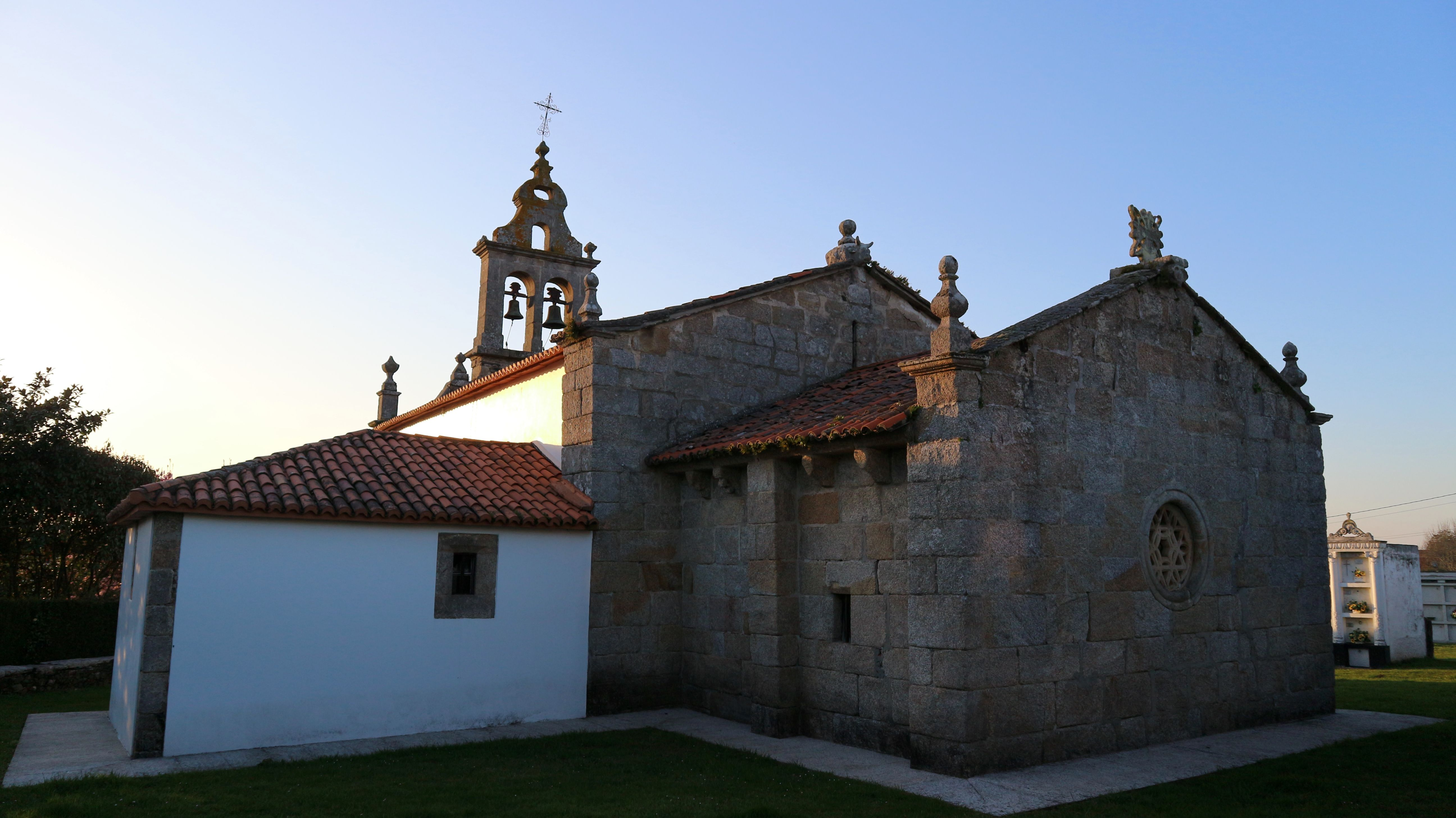 Igrexa de San Pedro de Porzomillos. Porzomillos, Oza-Cesuras.